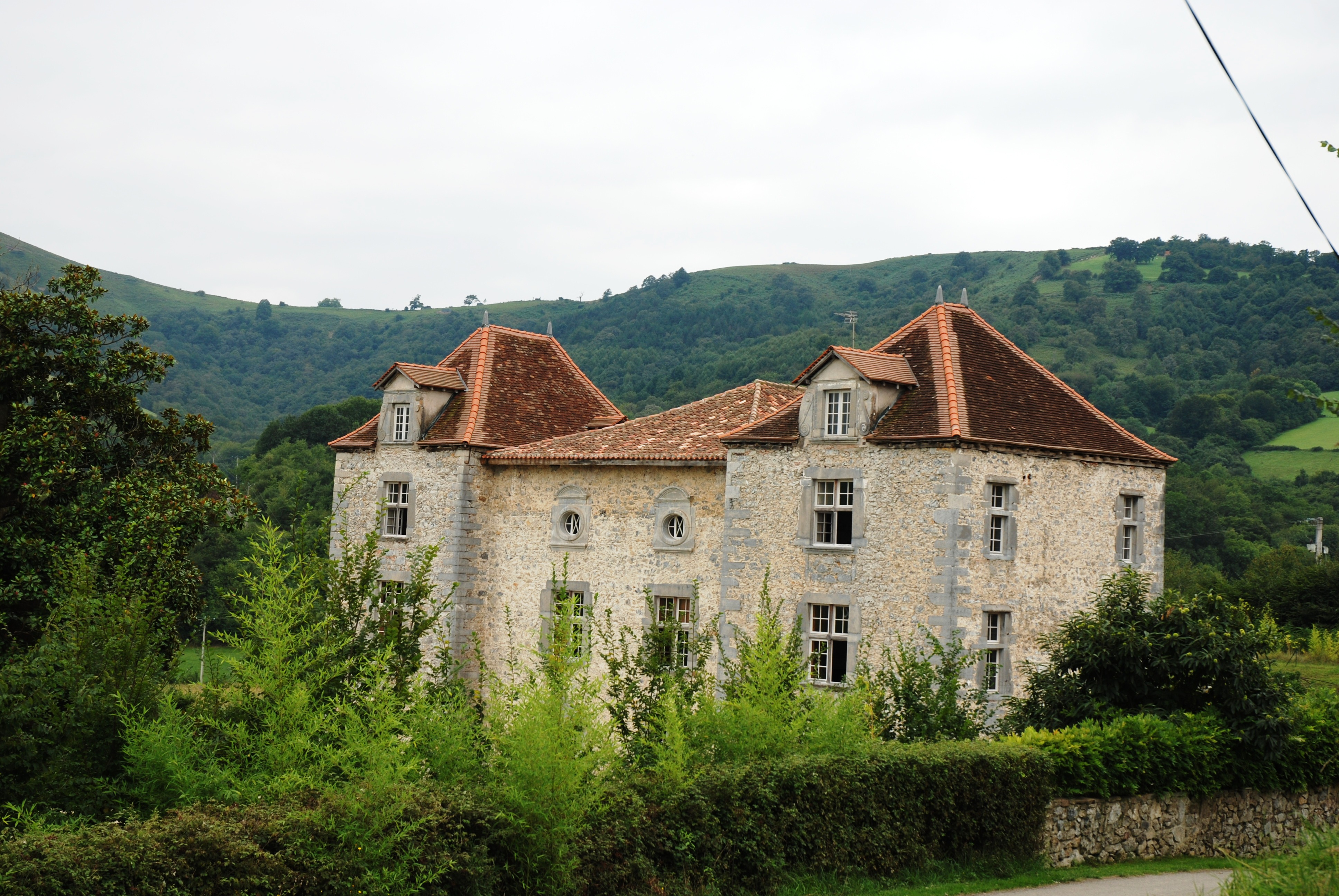 Iholdy, le château d'Olce